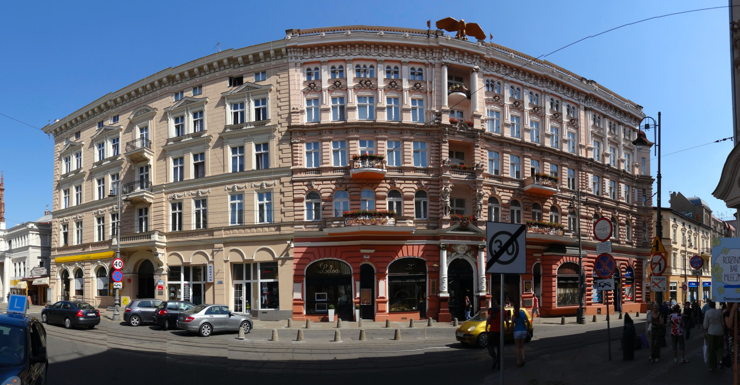 Ulica Gdańska w Bydgoszczy